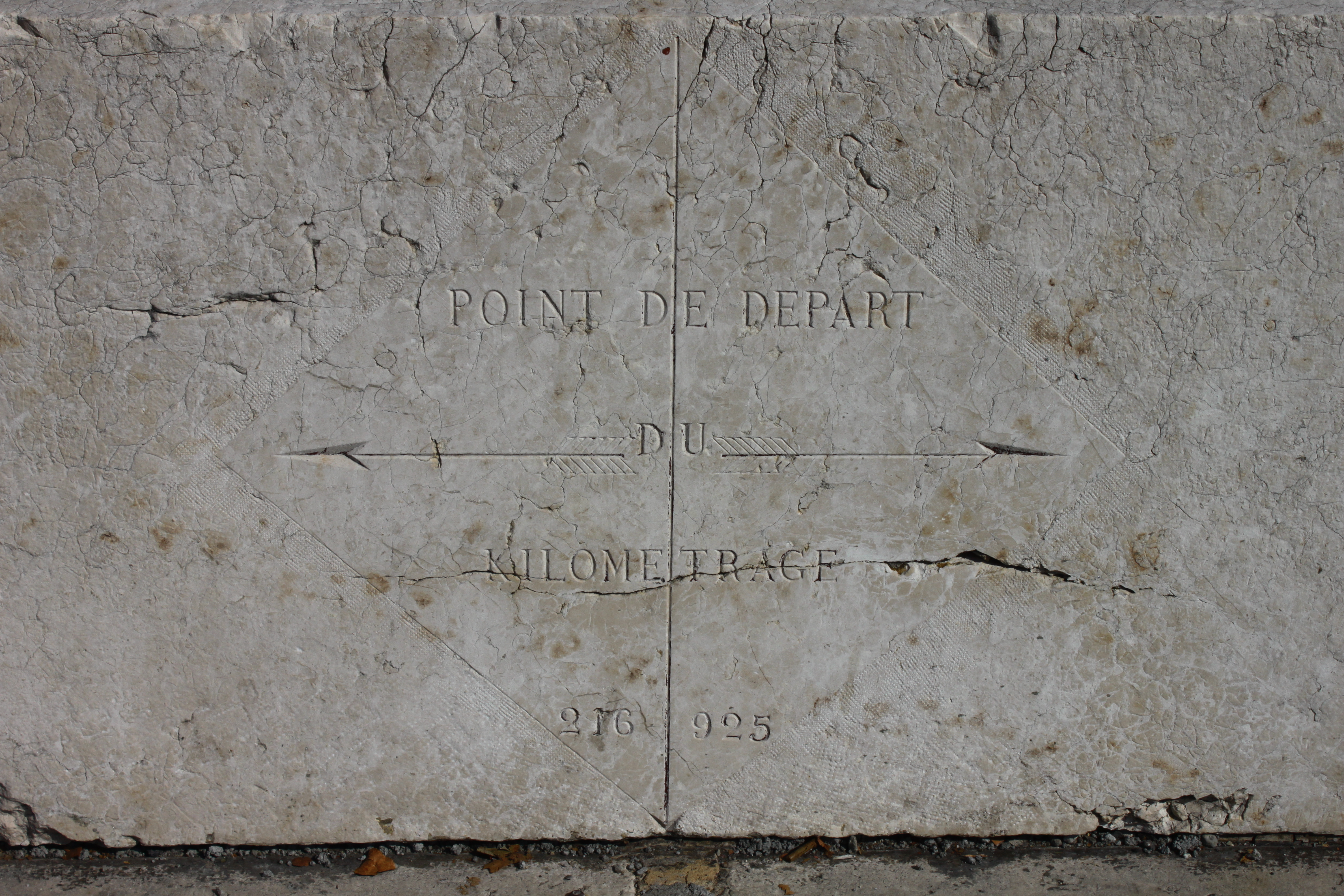 Point Kilomètre 0 à Grenoble